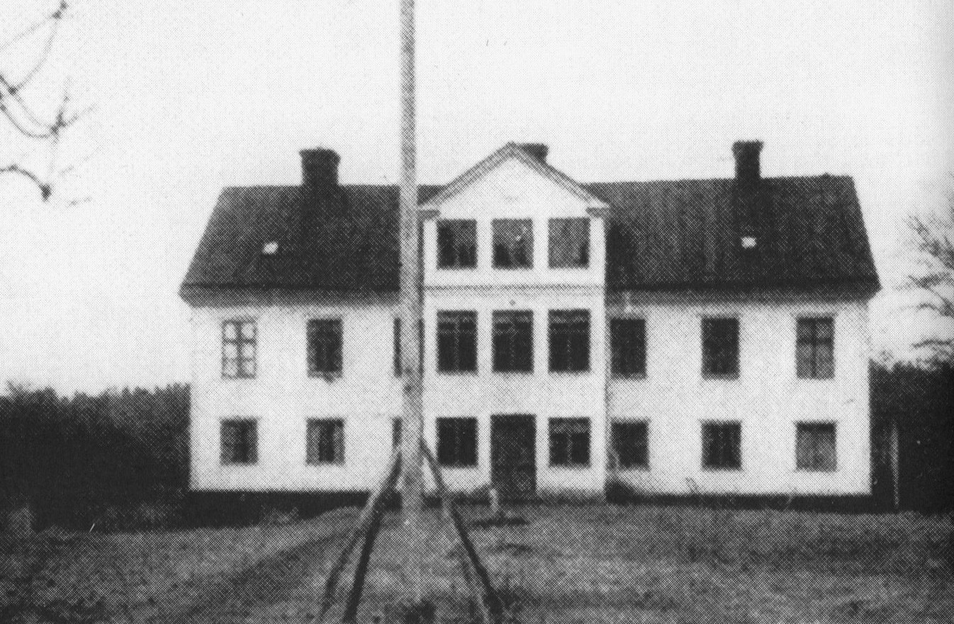 Hörningsnäs gård (nedbränd) låg vid dagens adress Rotnäsvägen 32